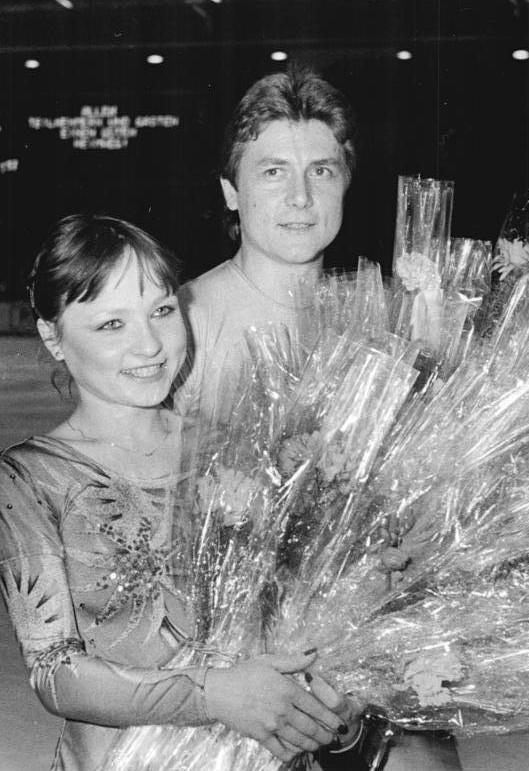 Sabine Baeß, Tassilo Thierbach ADN-ZB Thieme 7.4.82 Karl-Marx-Stadt: In einem glanzvollen Schaulaufen stellten sich am 6.4.82 in Karl-Marx-Stadt vor 5000 begeisterten Zuschauern alle Eiskunstlauf-Weltmeister und Medaillengewinner 1982 vor. Viele Blumen und Ovationen erhielten in ihrer Heimatstadt die Welt- und Europameister das Sportpaar, Sabine Baess - Tassilo Thierbach.